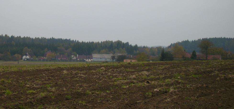 Ondrušky u Březí na Moravě